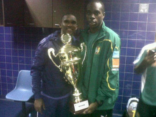 football